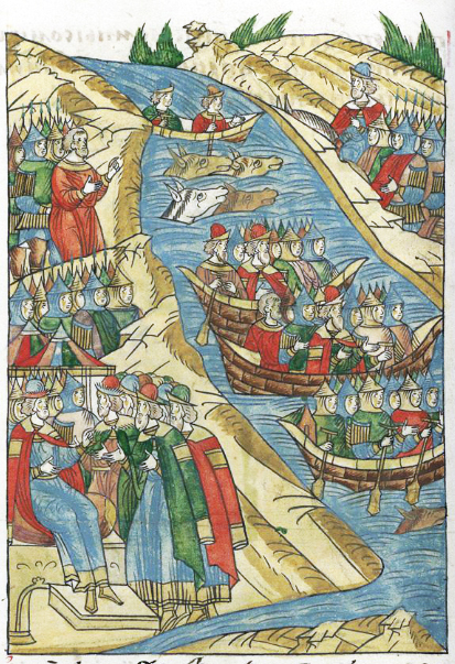 И тут, выслушав все вести, повелел им (через) Оку-реку переправляться и приказал каждому полку, говоря так: «Если кто пойдет по Рязанской земле, пусть никто ни к чему не прикасается и ничего не возьмет ни у кого, и ни единого же волоса не коснется».